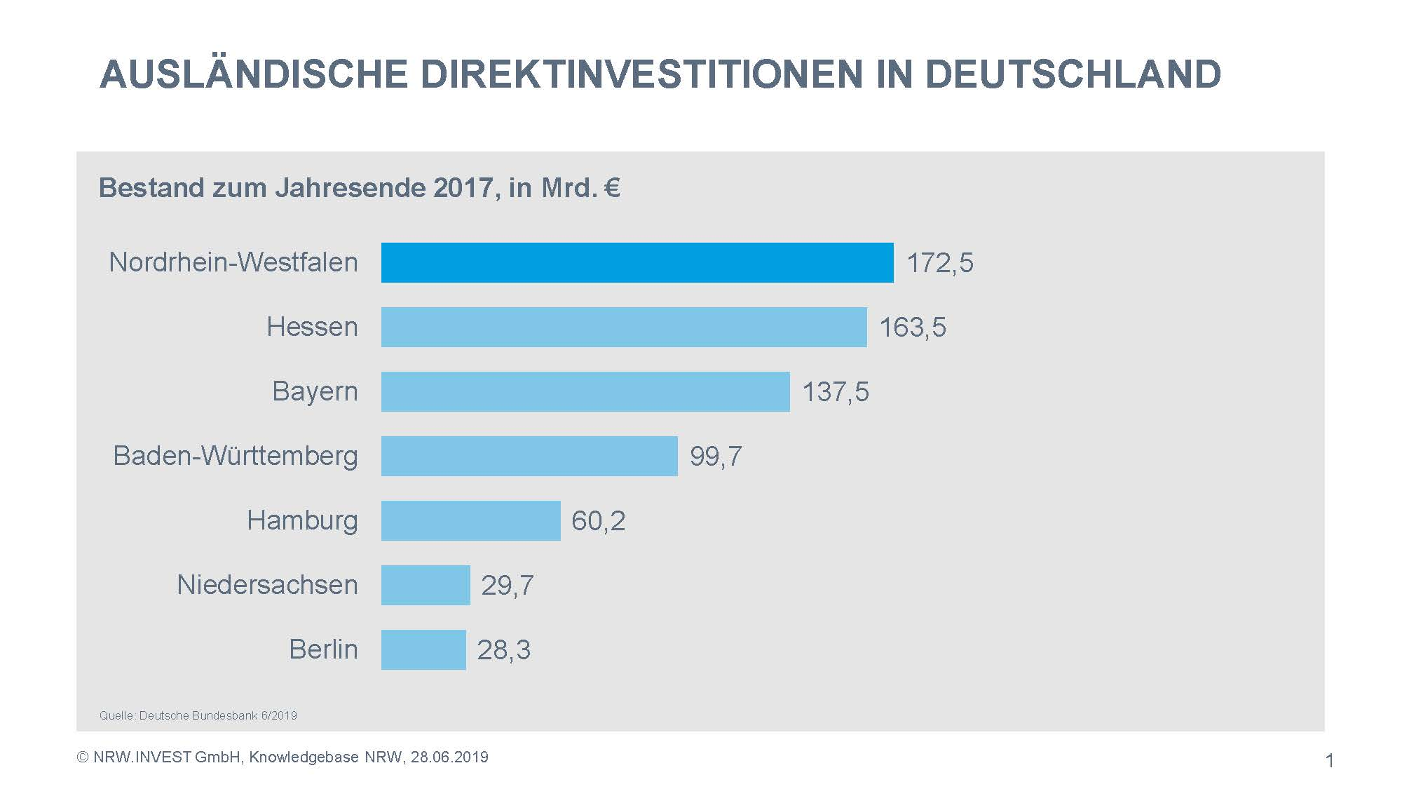 Diagramm: Ausländische Direktinvestitionen in Deutschland 2017